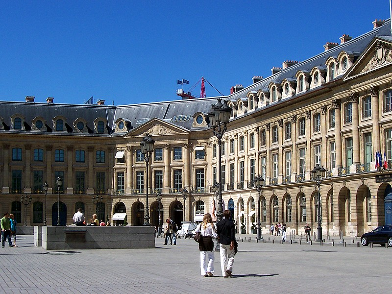 Parigi - Place Vendome